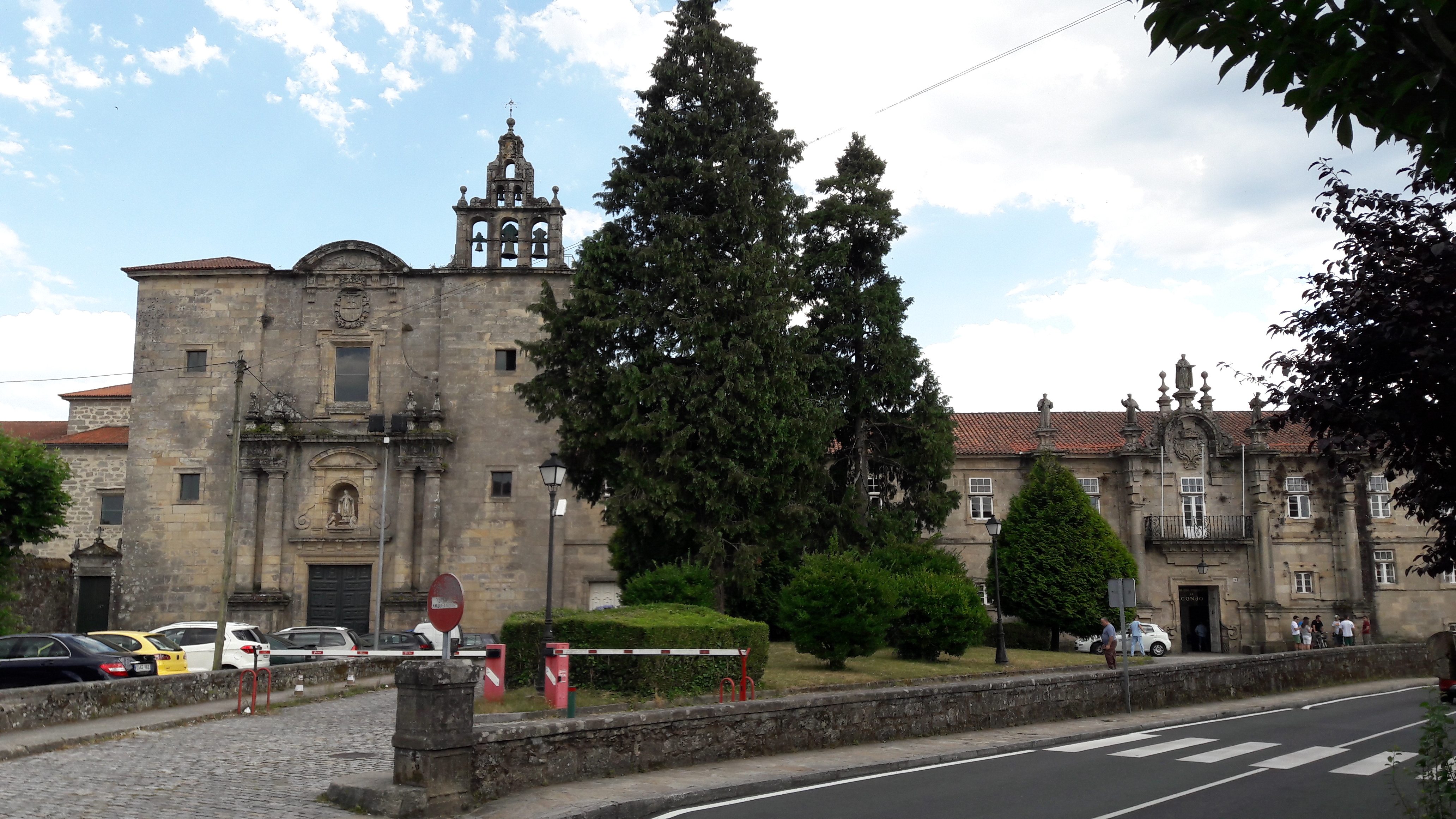 Hospital psiquiátrico de Conxo, Santiago de Compostela